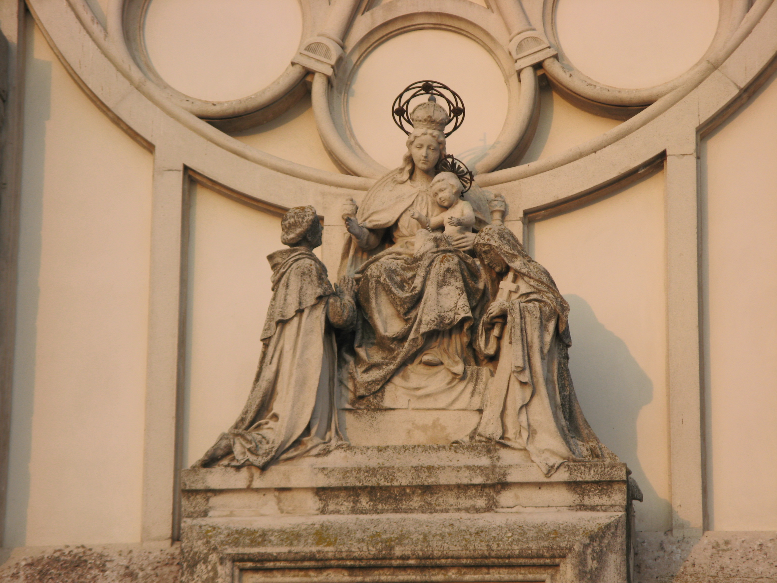 Madonna mit den hll. Dominikus und Katharina an der Hetzendorfer Pfarrkirche (1908-09) in Wien-Meidling